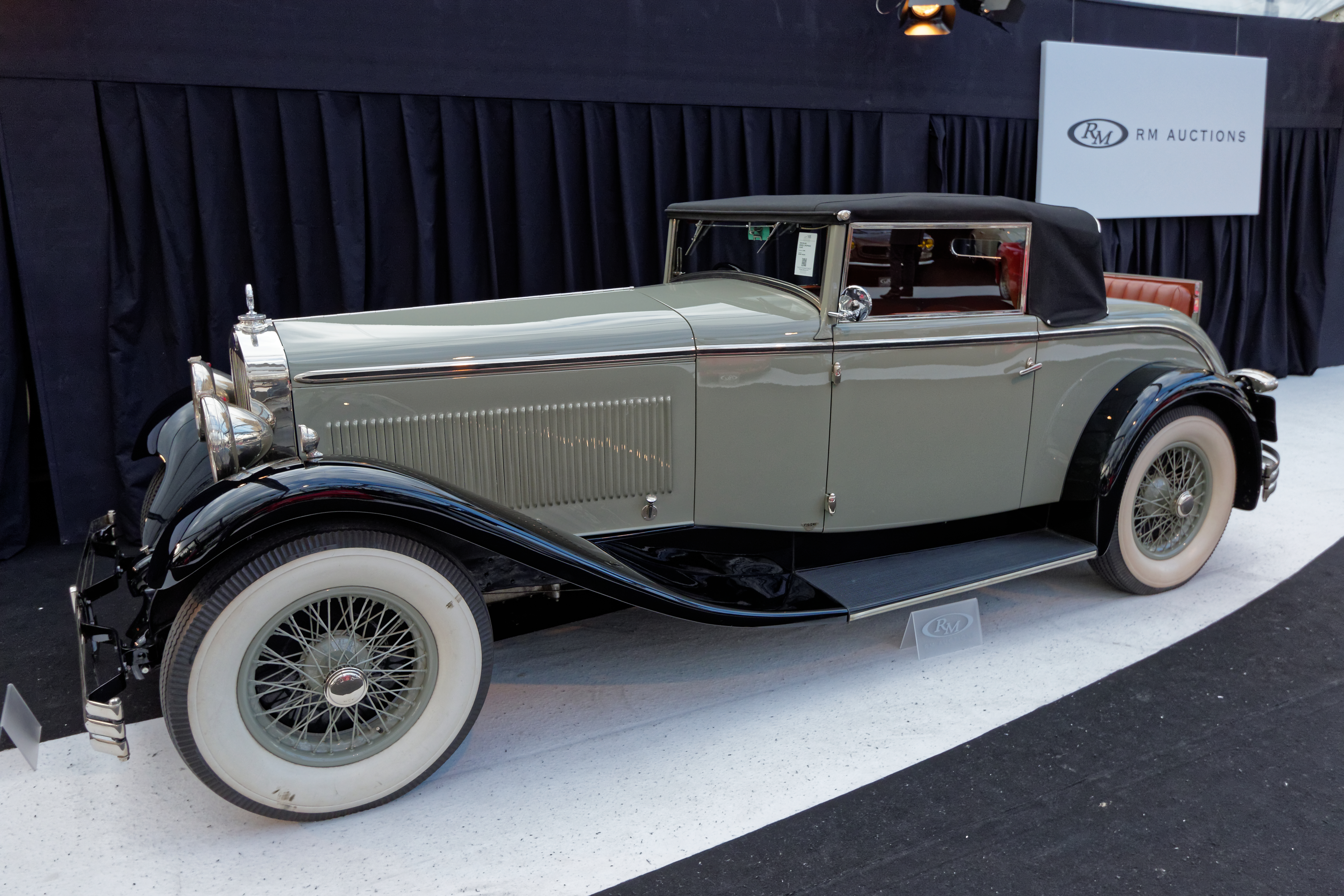 La vente aux enchères RM auctions aux pied des Invalides à Paris le 4 février 2015.